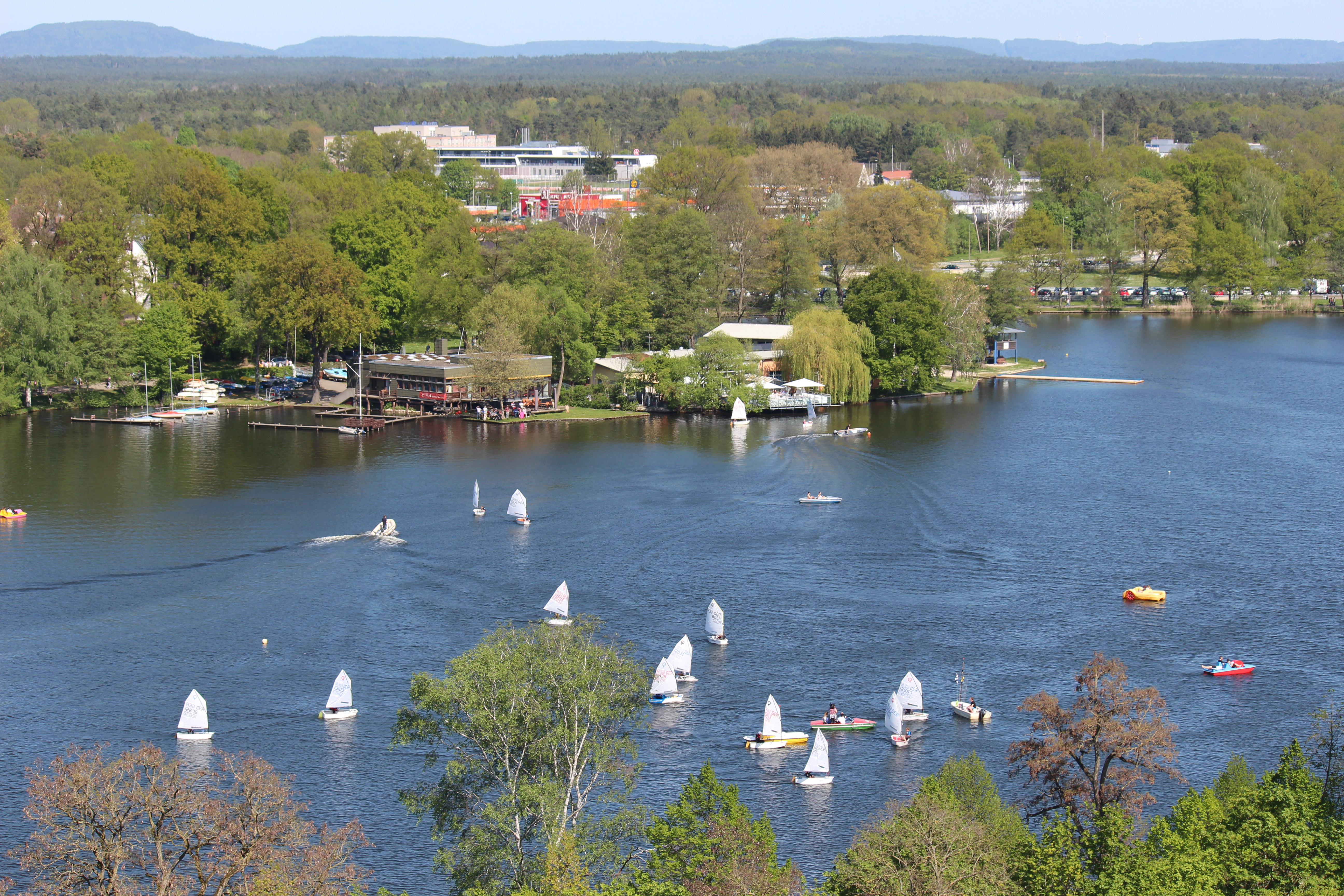 Luftbild vom Großen Dutzendteich (Nürnberg) mit Clubhaus des YCN und Segelbooten während einer Regatta (OPTI-Trichter YCN)